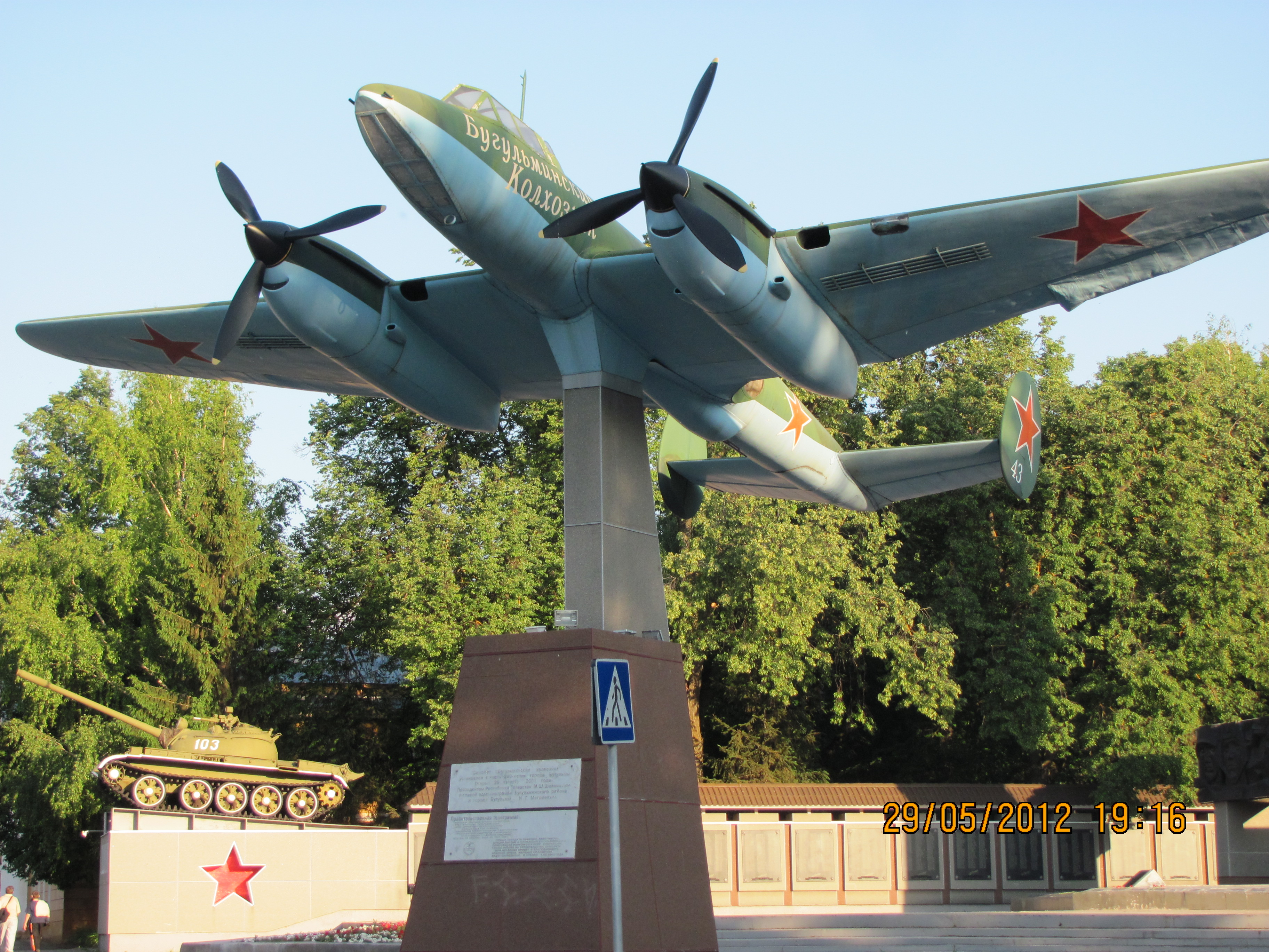 Мемориал Вечный Огонь